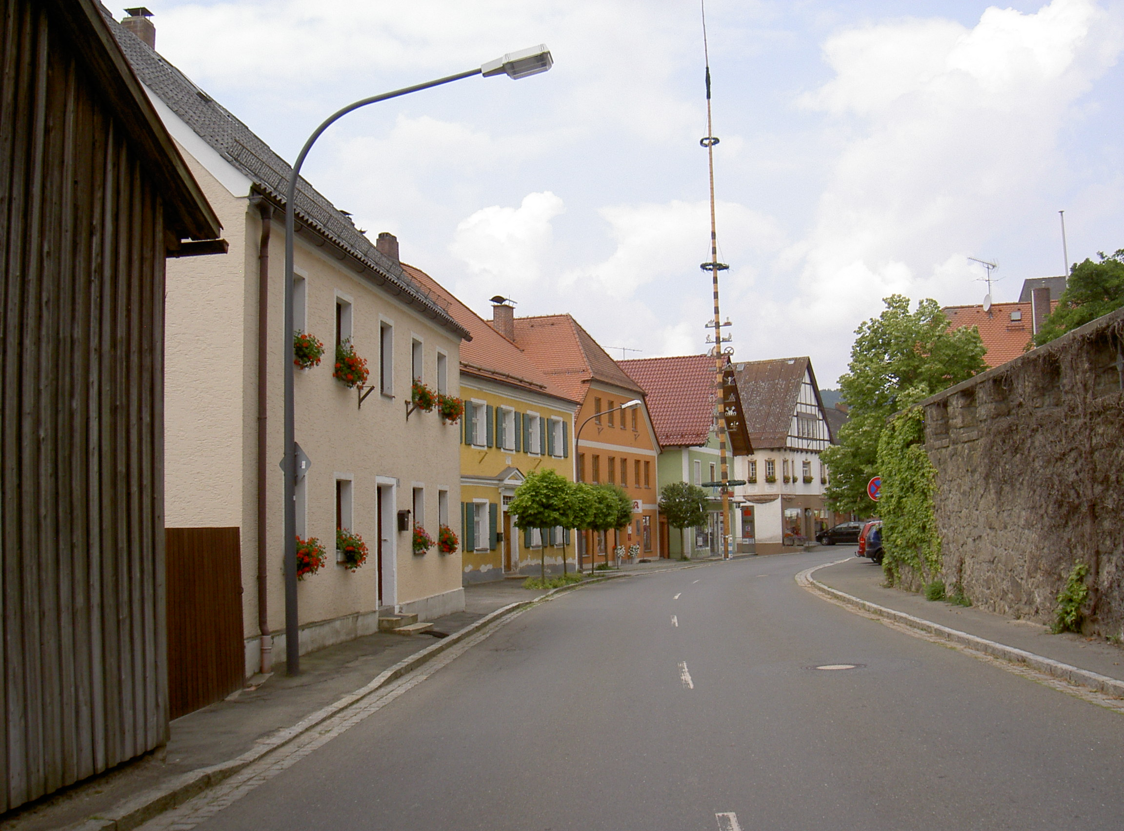 Tiefenbach Hauptstraße